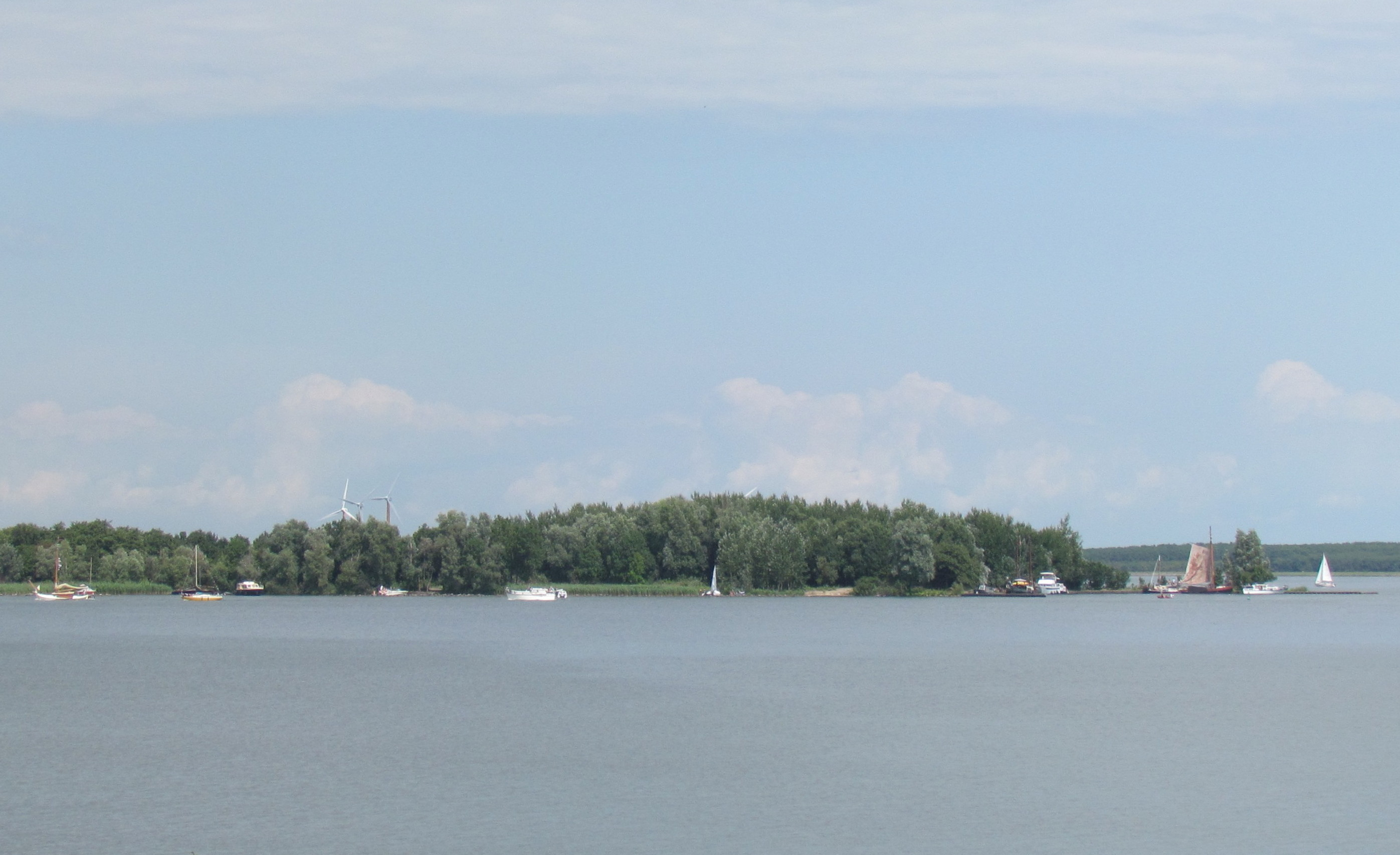 Hooft, kunstmatig eiland in het IJmeer, ten noordwesten van Muiderberg